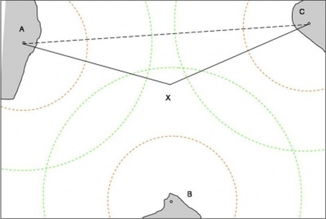 ETOPS